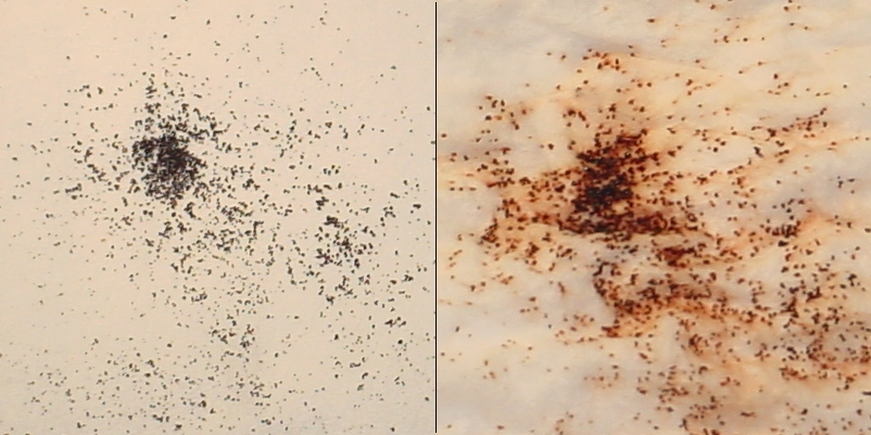 linker Bildteil: einer Katze ausgekämmter Flohkot; rechter Bildteil: Flohnachweis; der Flohkot sieht nach Anfeuchten auf saugfähiger weißer Unterlage rötlich aus.